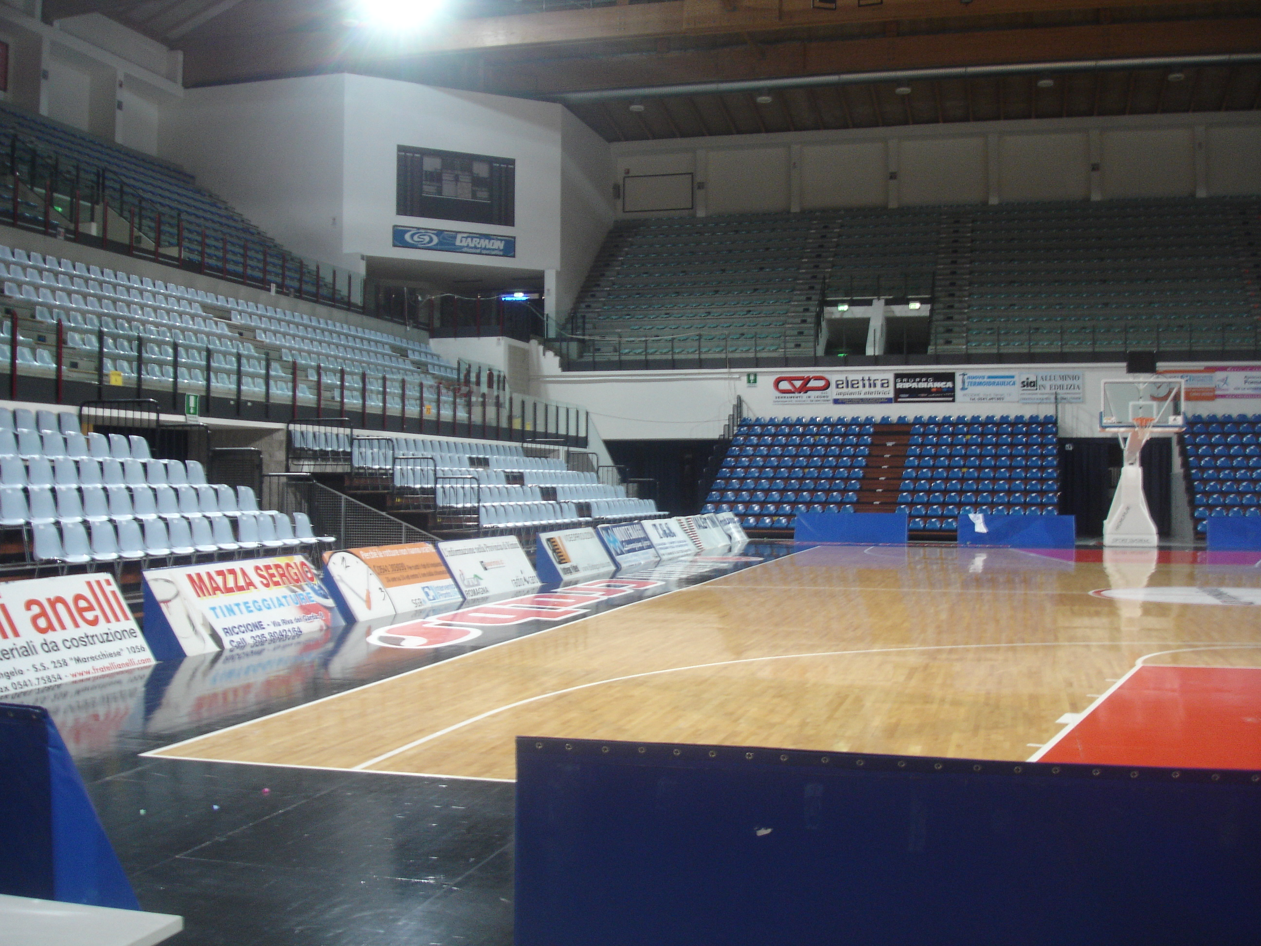 una visuale dell'interno del 105stadium di rimini